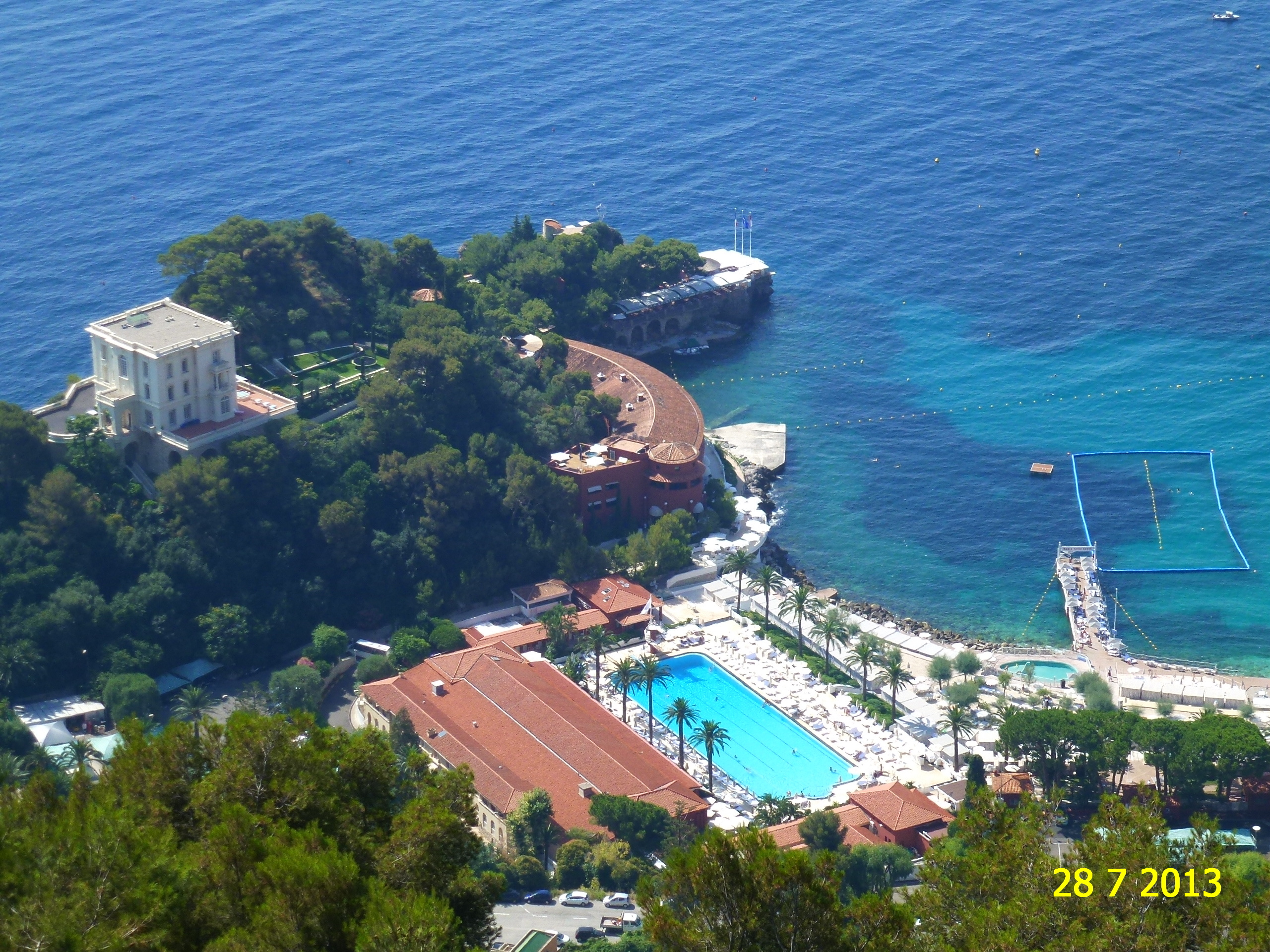 MONACO, JULY 2013.